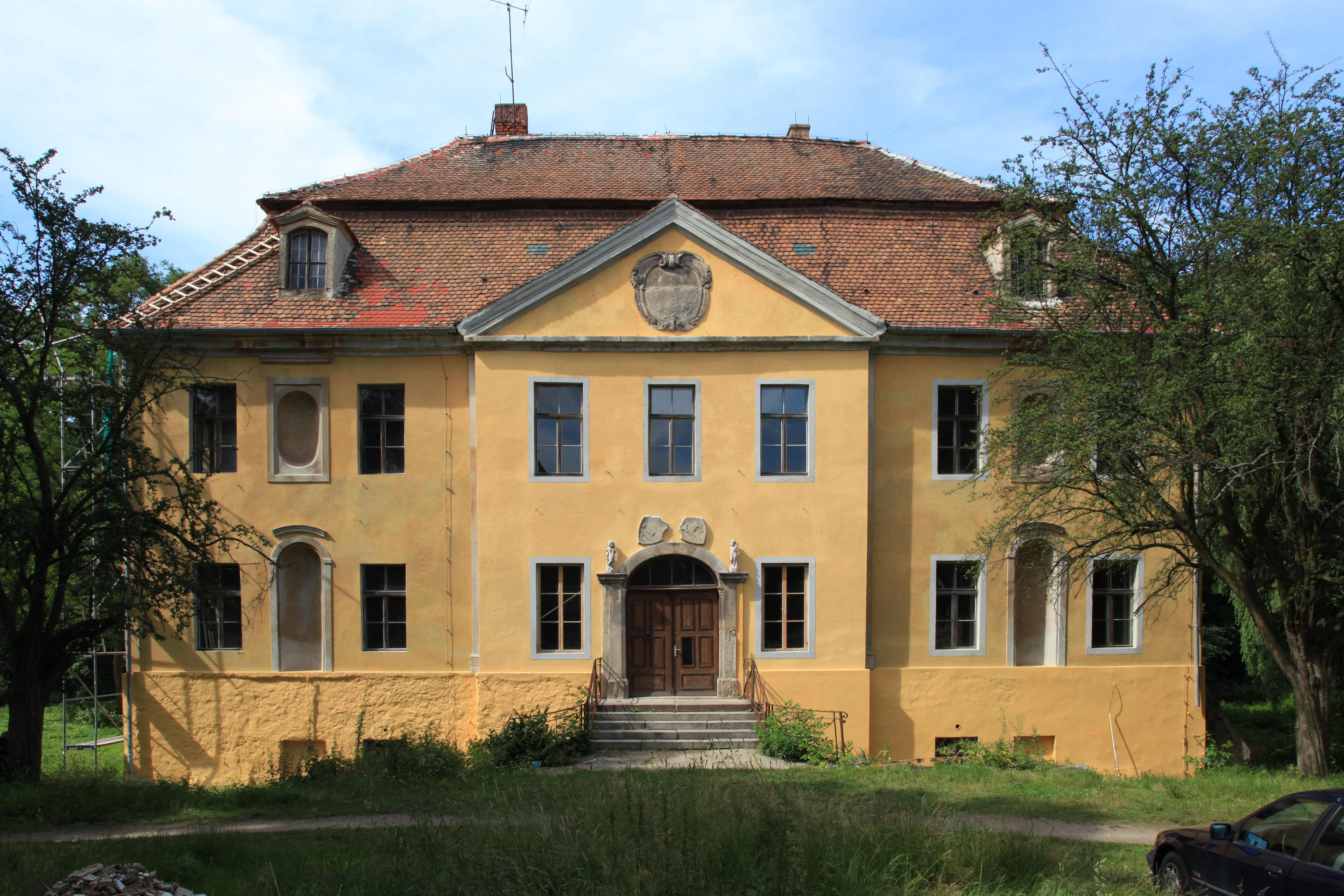 Schloss Radibor, Am Schloß in Radibor Hornjoserbsce: Radworski hród